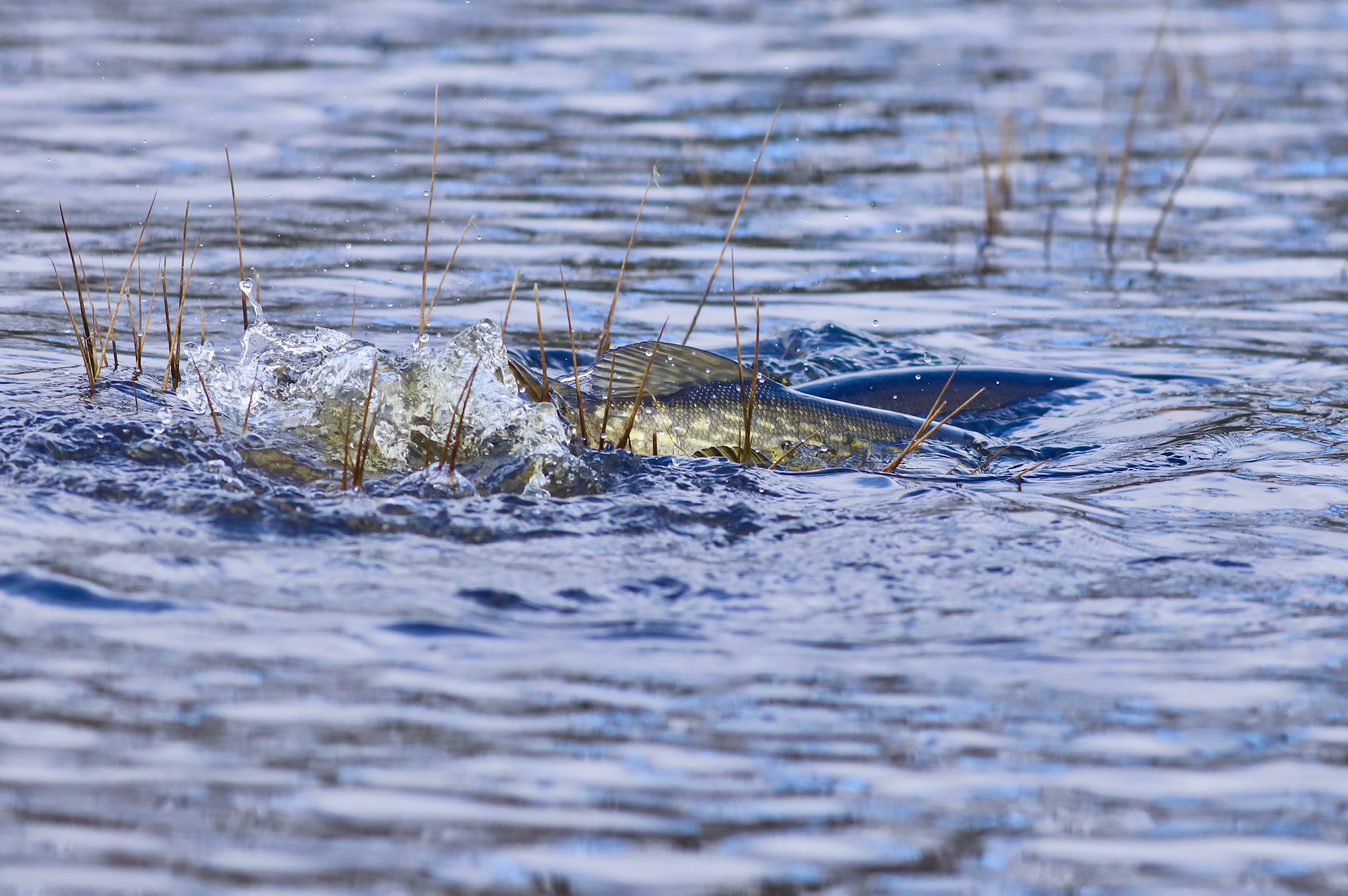 Gädda (Esox lucius) leker på grunt vatten i översvämmade våtmarker. Gäddfabrik.